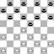 Табия дебюта Перекрёсток в русских шашках